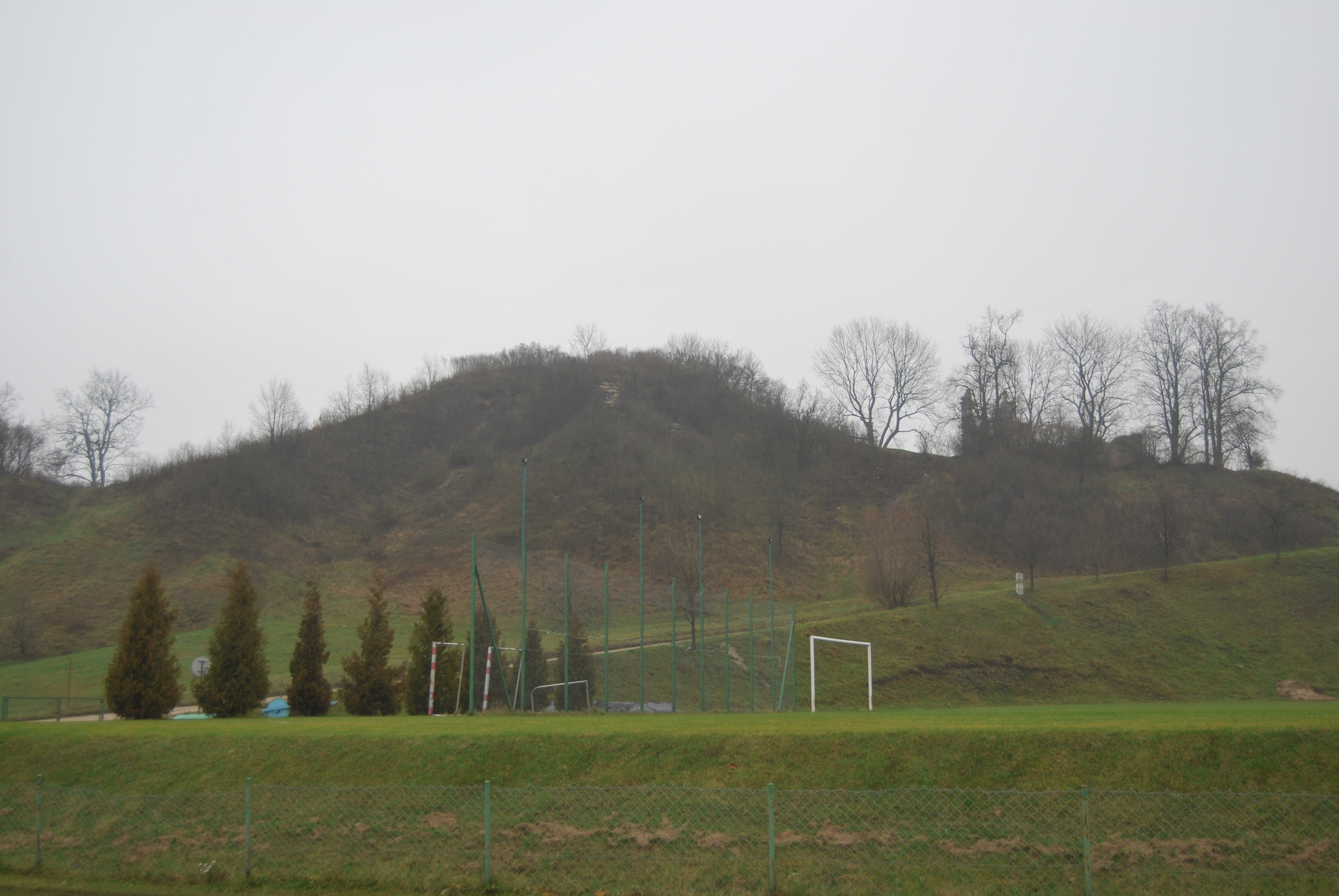 Góra zamkowa w Mielniku. Po prawej w kępie drzew ruiny kościoła zamkowego.